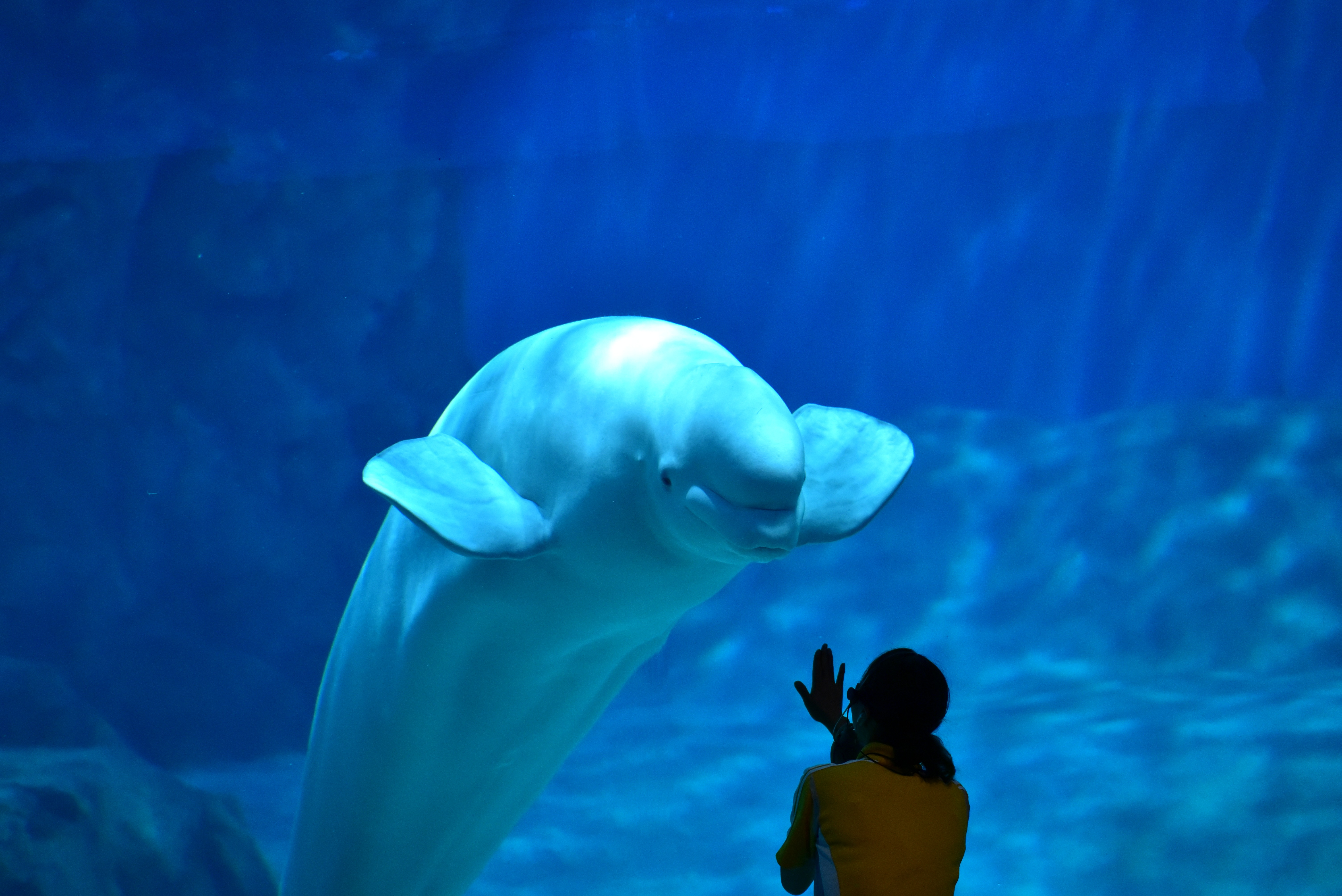 名古屋港水族館のベルーガ